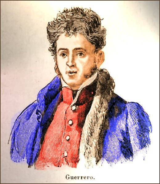 Vicente Guerrero, militar mexicano